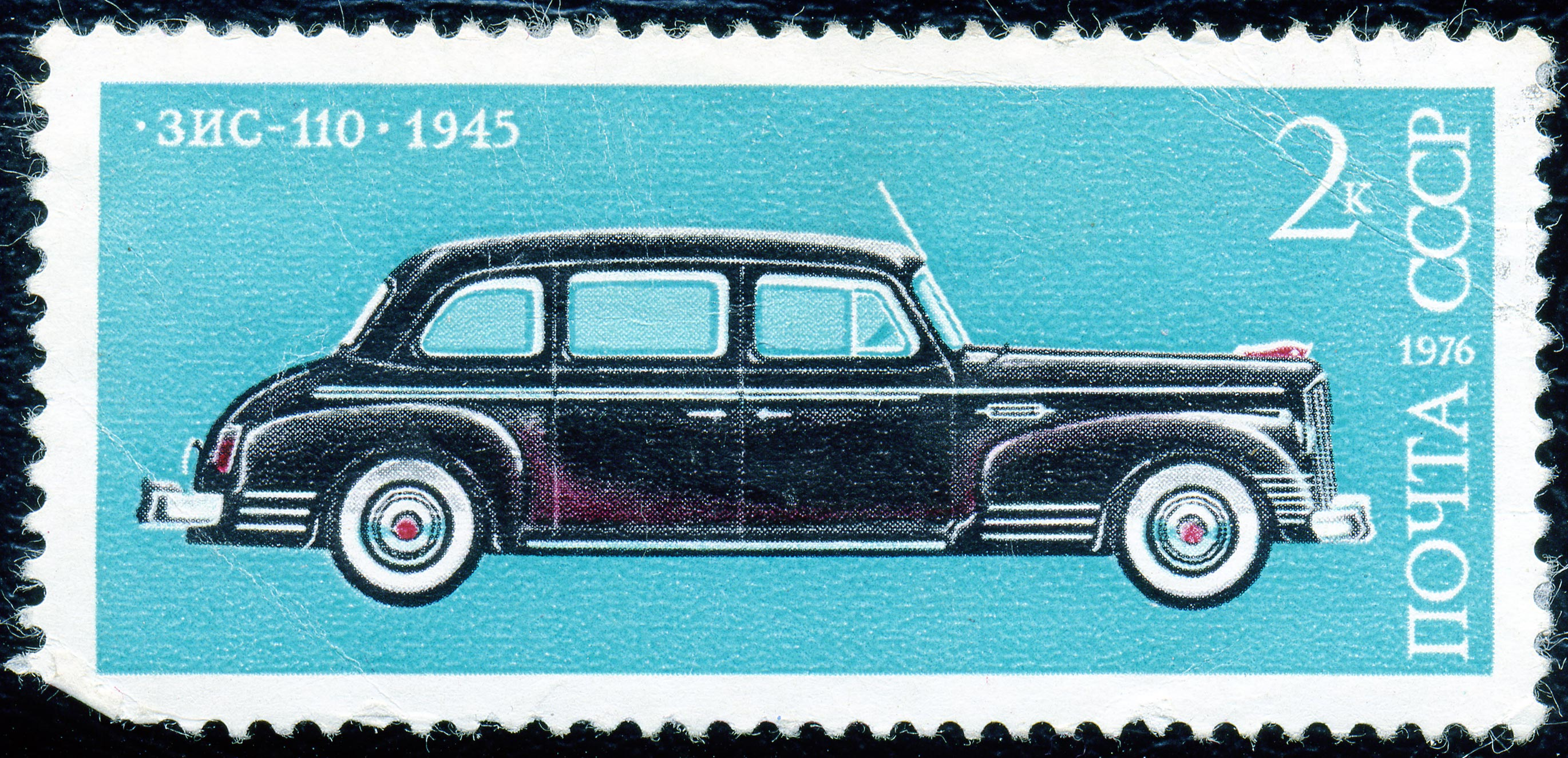 Почтовая марка СССР. Зис-110